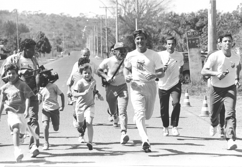 O presidente Fernando Collor corre nas proximidades da casa da Dinda.